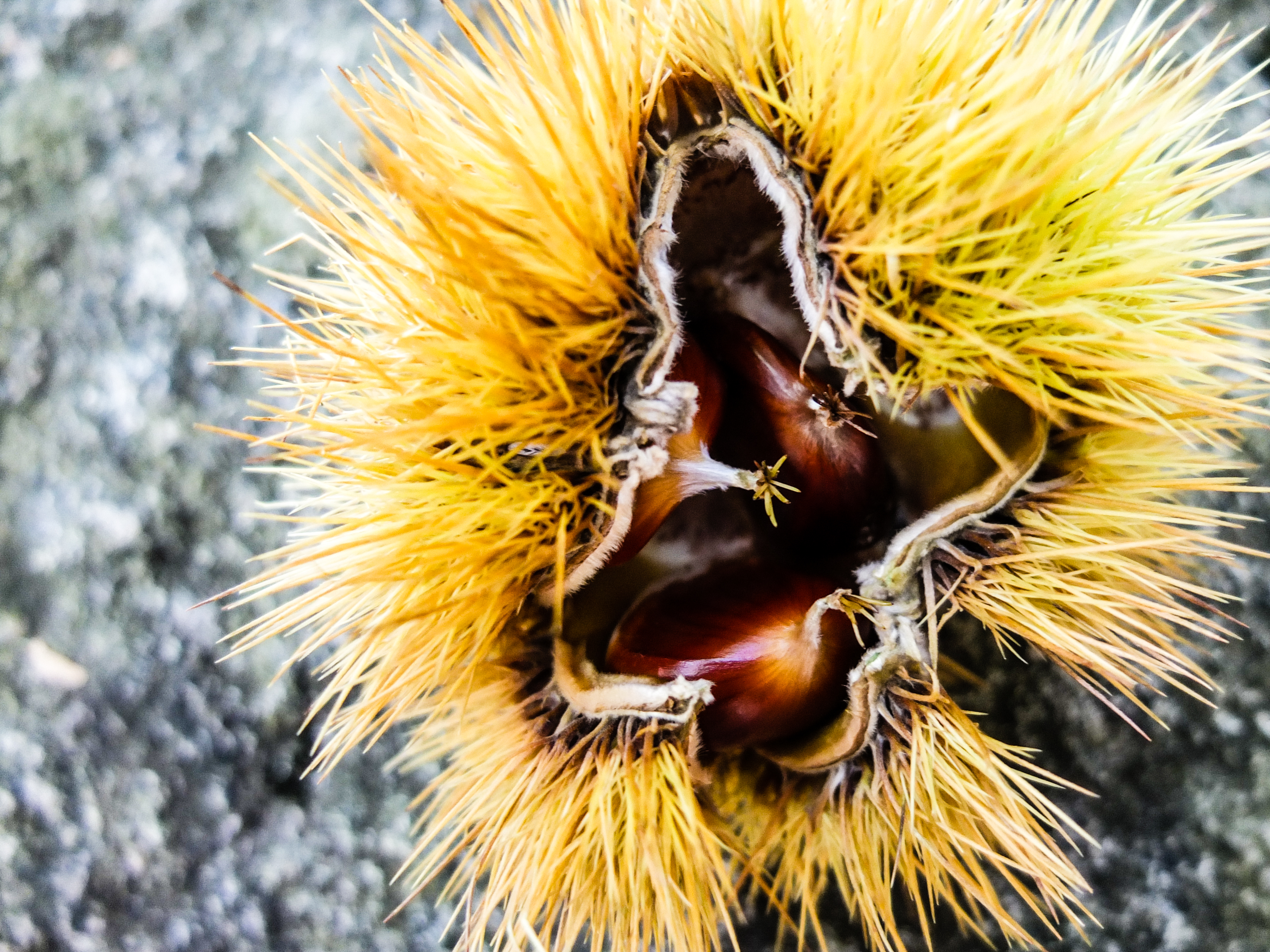 Val Codera (Q49155378)